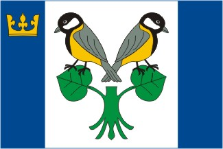 Sýkořice